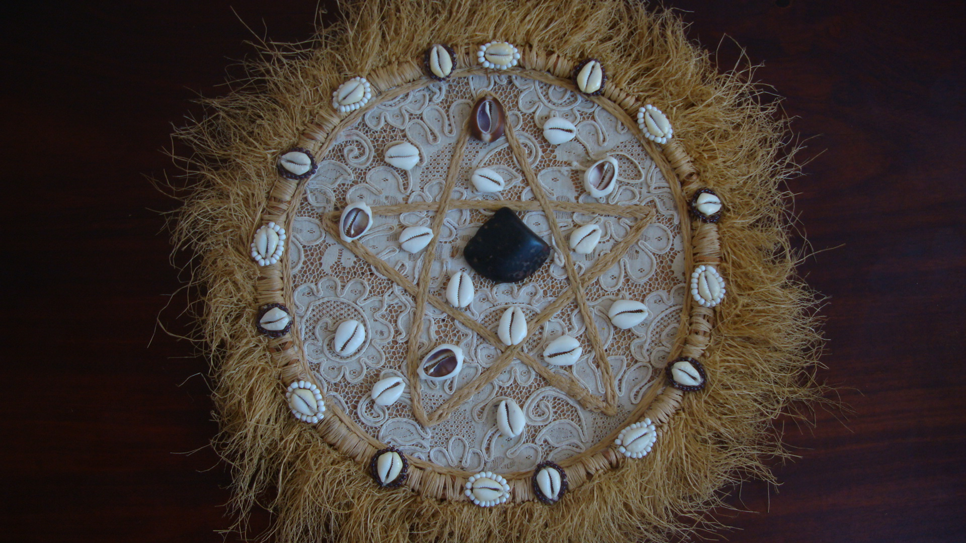 Odu Êjilaxeborá Merindilogun, Salvador, Bahia, Brasil.